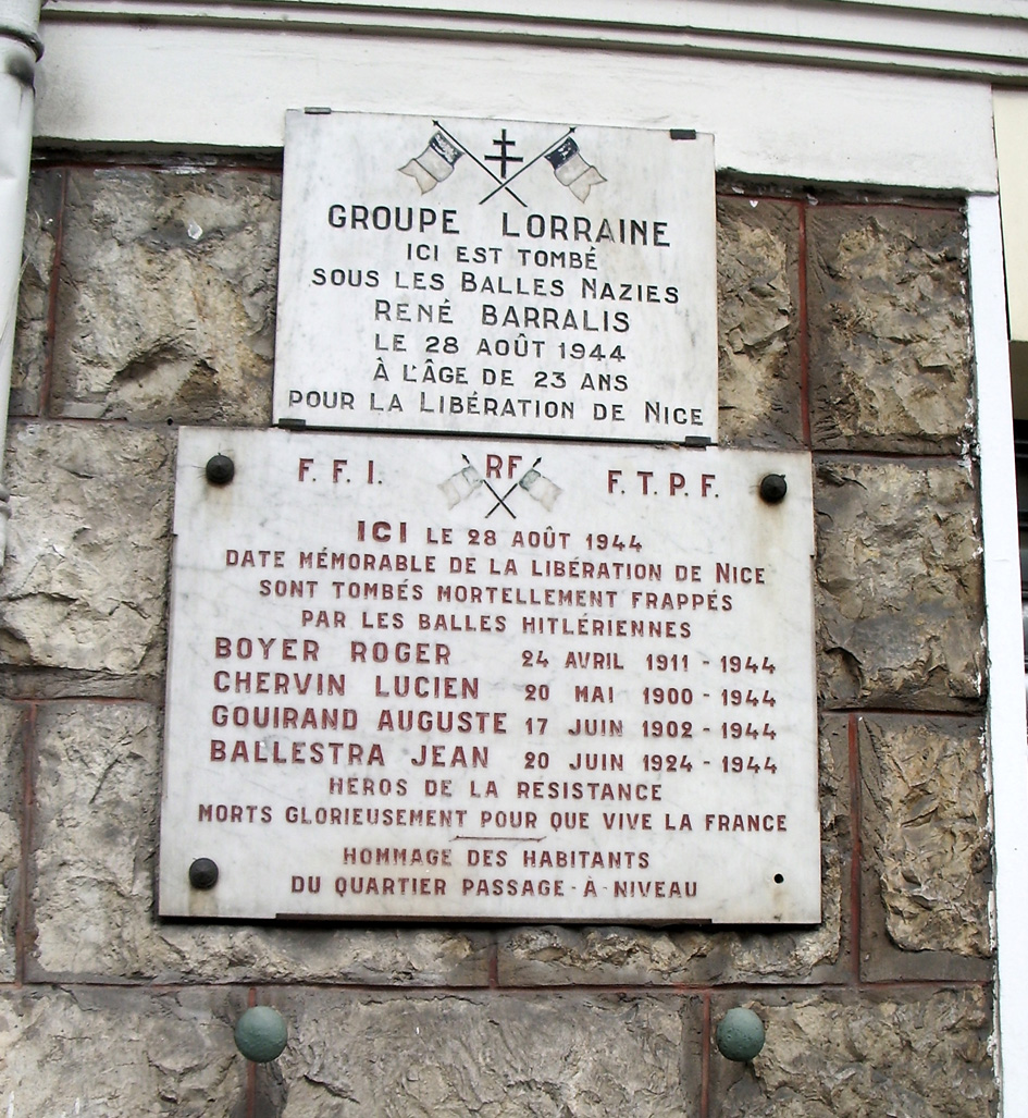 Plaque commemorative au carrefour du 28 août à Nice, qui rappelle le sacrifice de combattants durant l'insurrection niçoise en 1944 contre l'occupation étrangère.